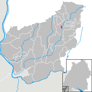 Wembach, Landkreis Lörrach, Baden-Württemberg